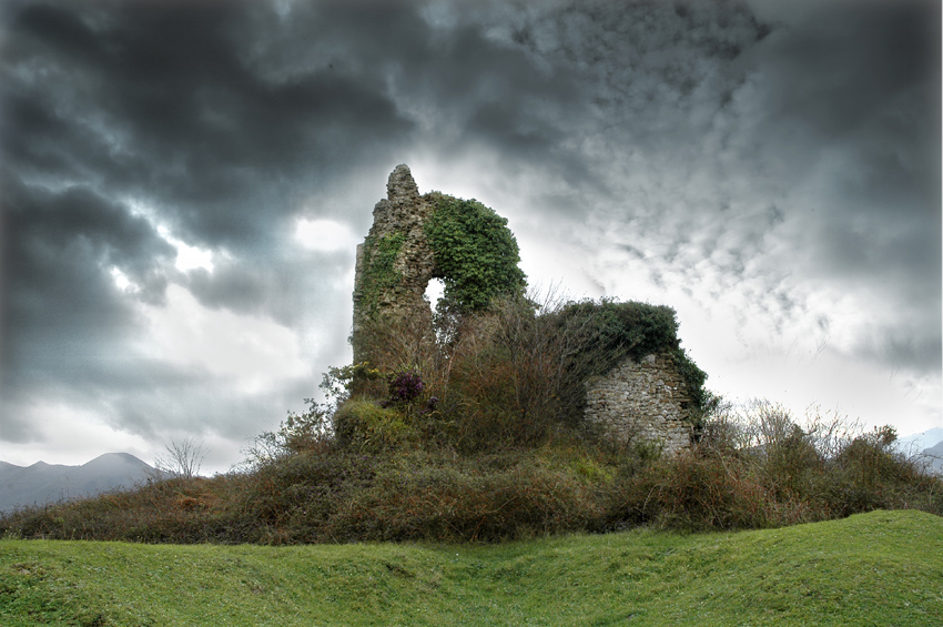 Ref.0413-Picu Castiellu